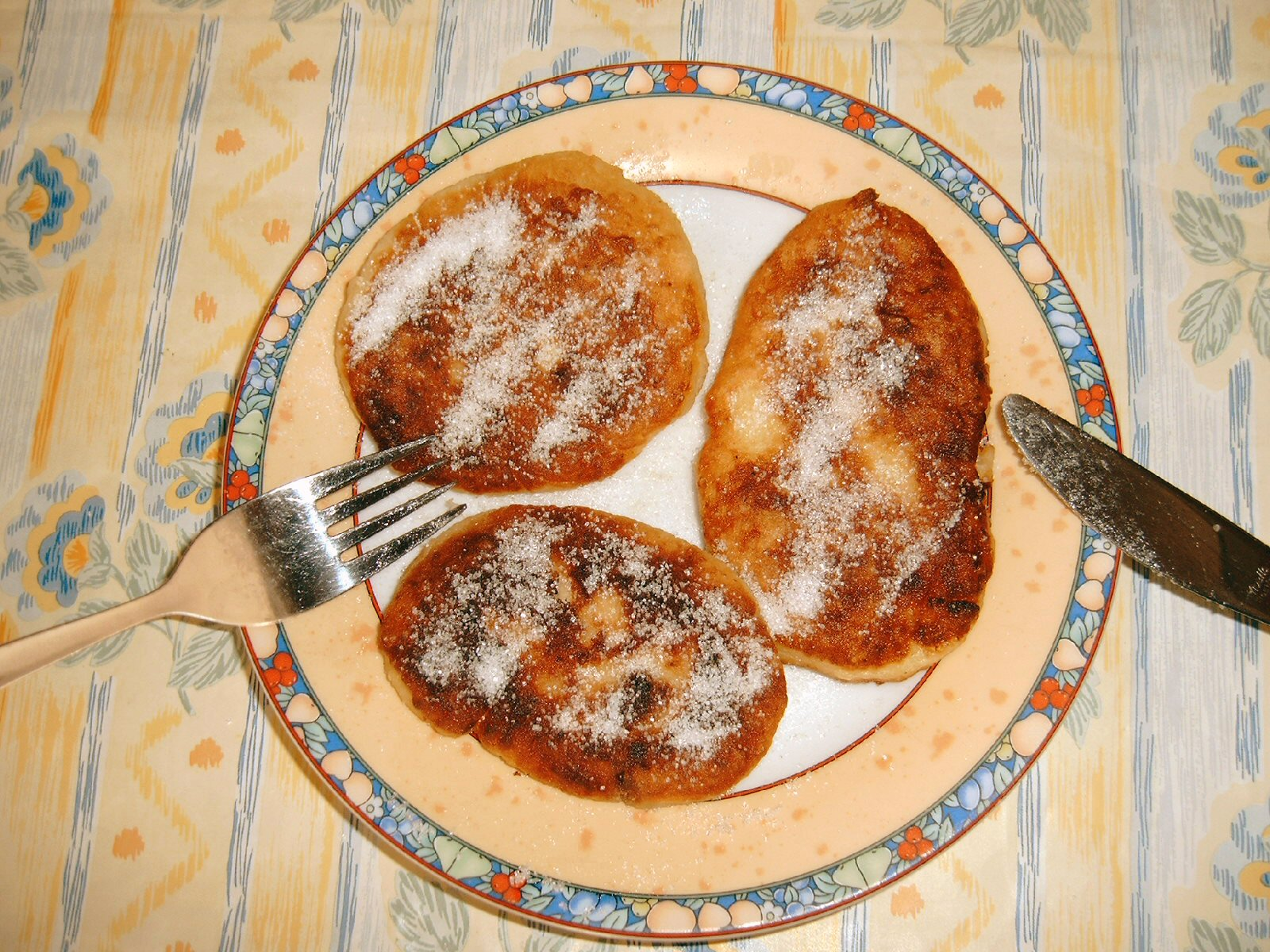 Quarkkeulchen